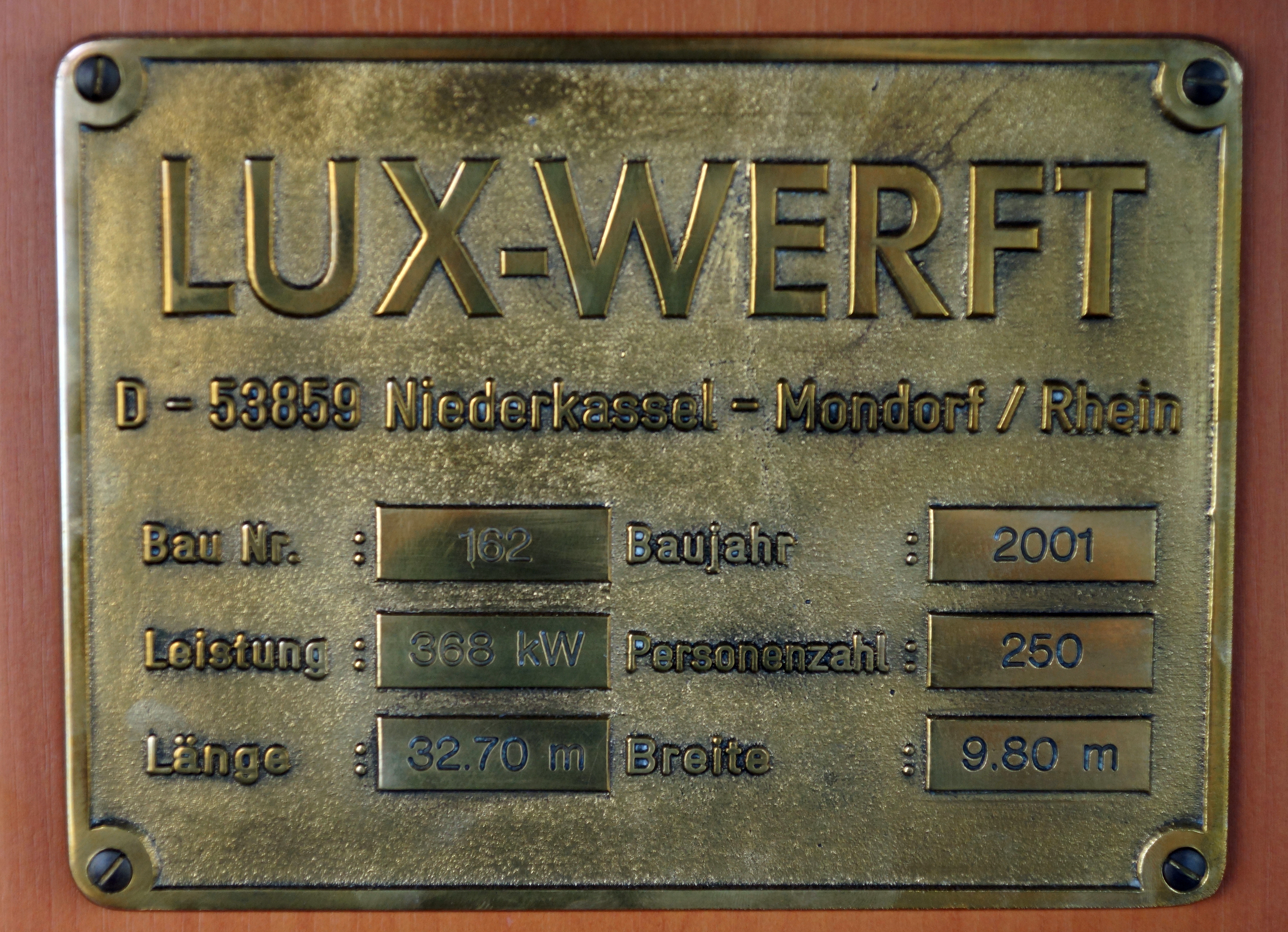 Das Produktionsschild des Fahrgastschiffs RheinCargo von der Lux-Werft.